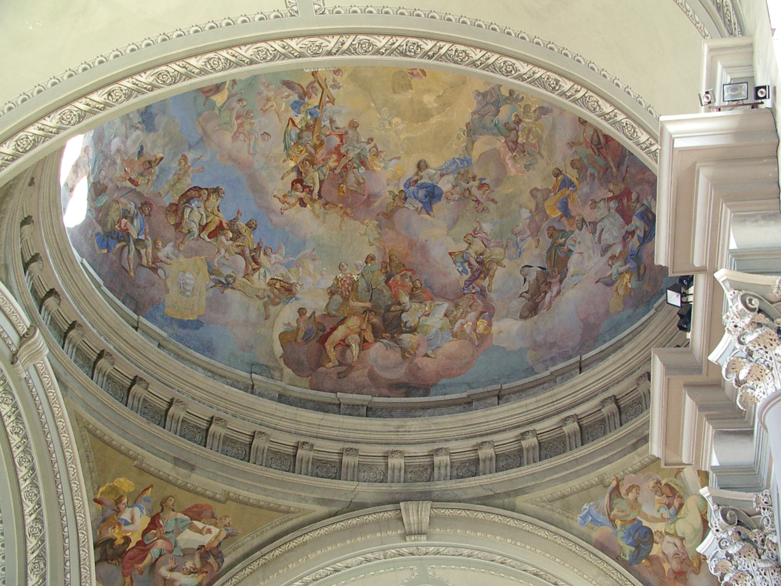 A váci székesegyház freskója